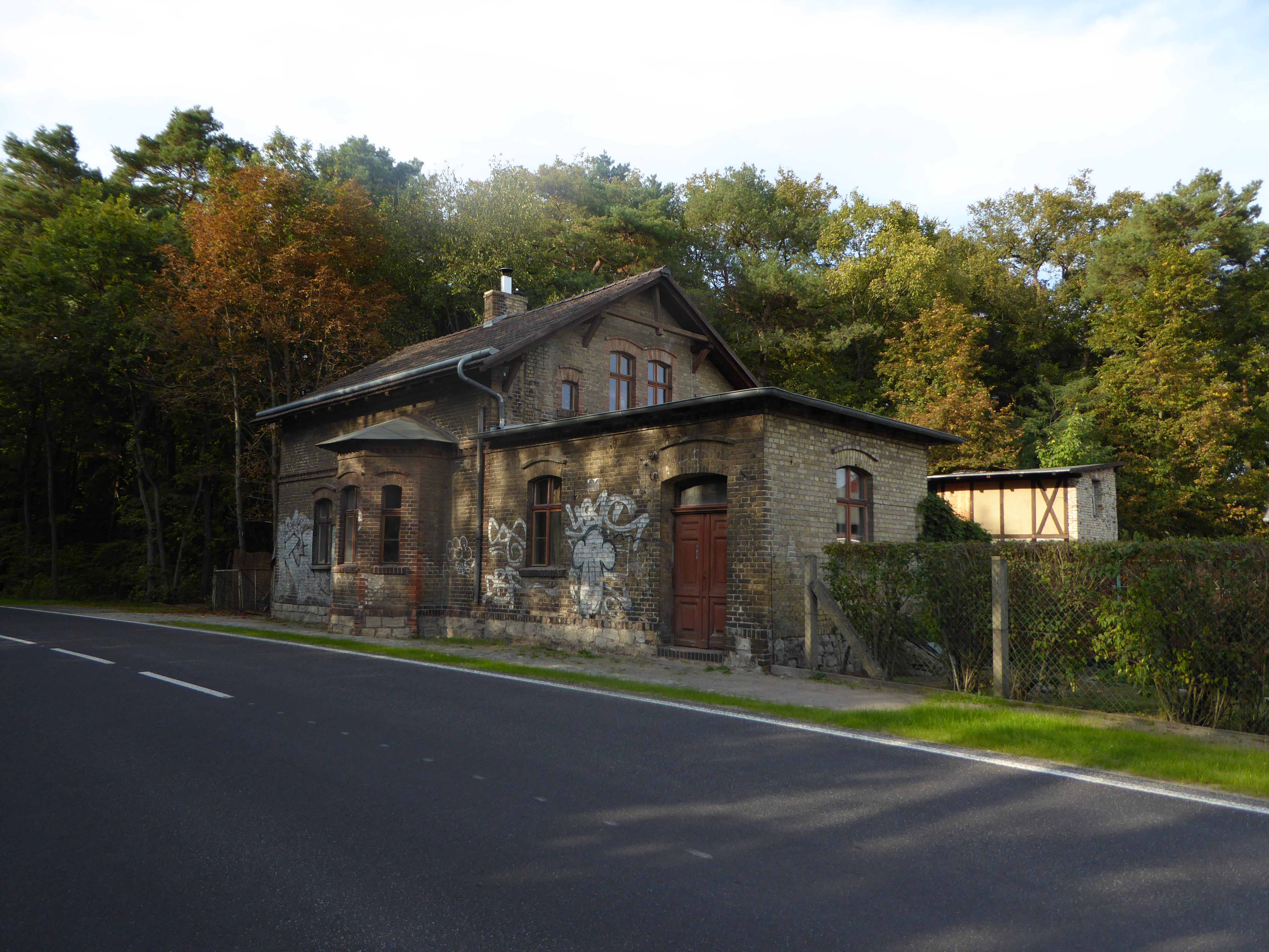 Baudenkmal Strausberg OT Torfhaus Torfhaus 16 Chausseehaus